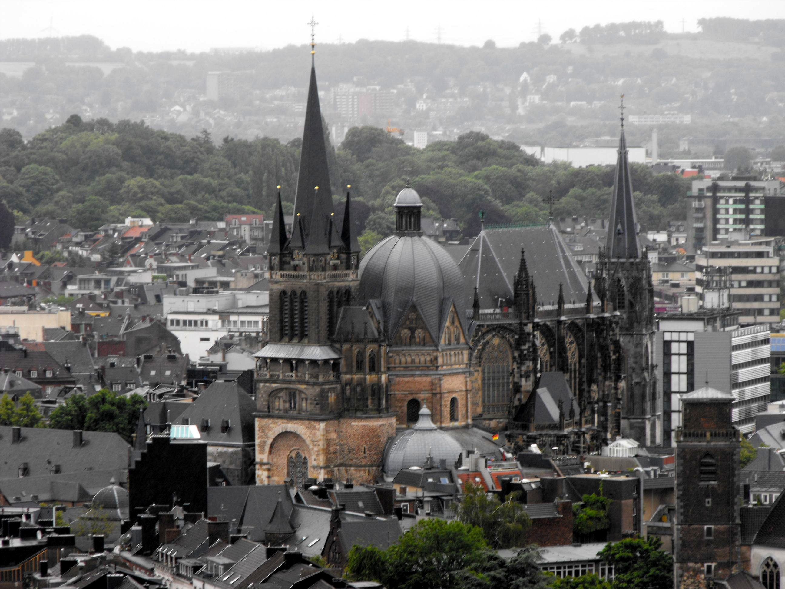 Blick von St. Jakob auf den Aachener DomThis is a photograph of an architectural monument., no. 0